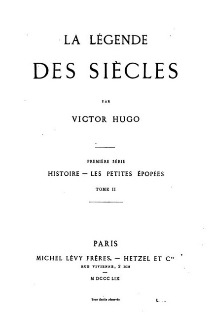 La Légende des siècles, 1ère série, tome 2